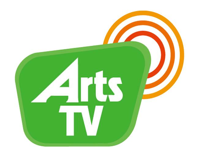 國立臺灣藝術大學廣播電視學系網路電視台